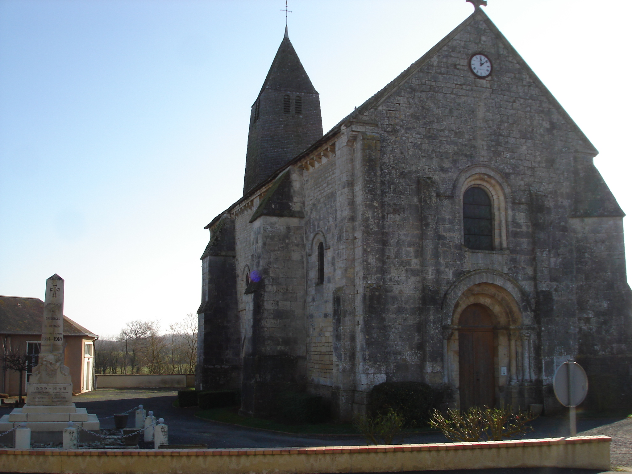 Sassierges-Saint-Germain (36) : L'église Saint-Germain.